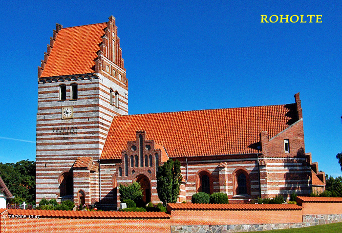 fra syd